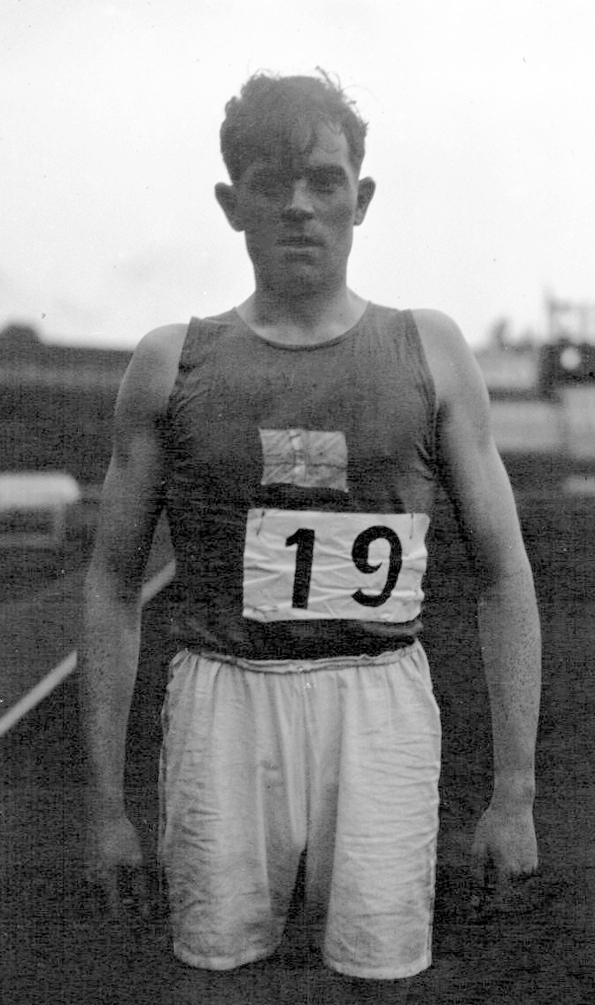 Sjoestedt, recordman du monde du 110 m haies (Finlande) : [photographie de presse] / Agence Mondial